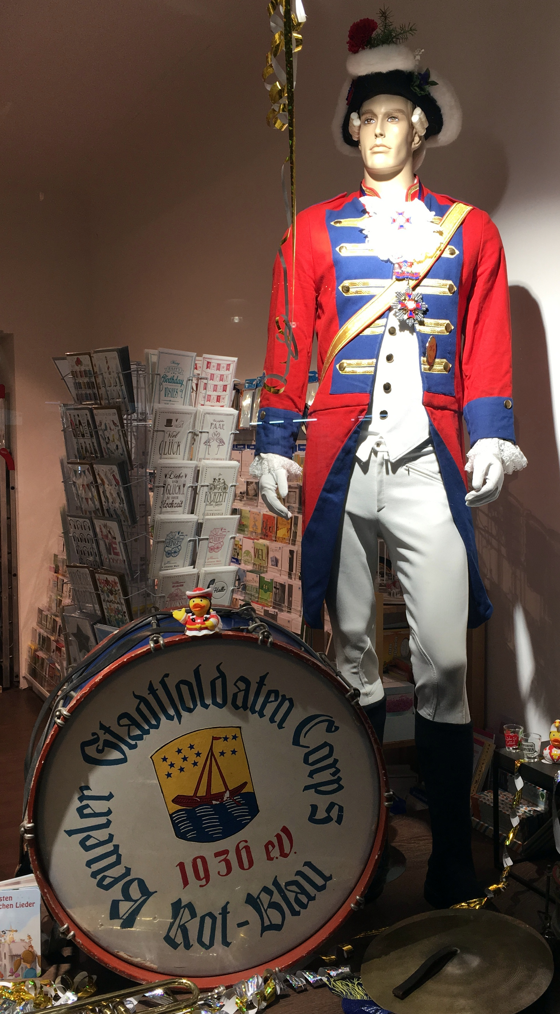 Exponat im Schaufenster einer Schreibwarenhandlung in Bonn-Beuel: Uniform eines Bonner Stadtsoldaten, Mitglied des Beueler Stadtsoldaten-Corps „Rot-Blau“ 1936 e.V.; einer der großen Karnevalsvereine in Bonn-Beuel